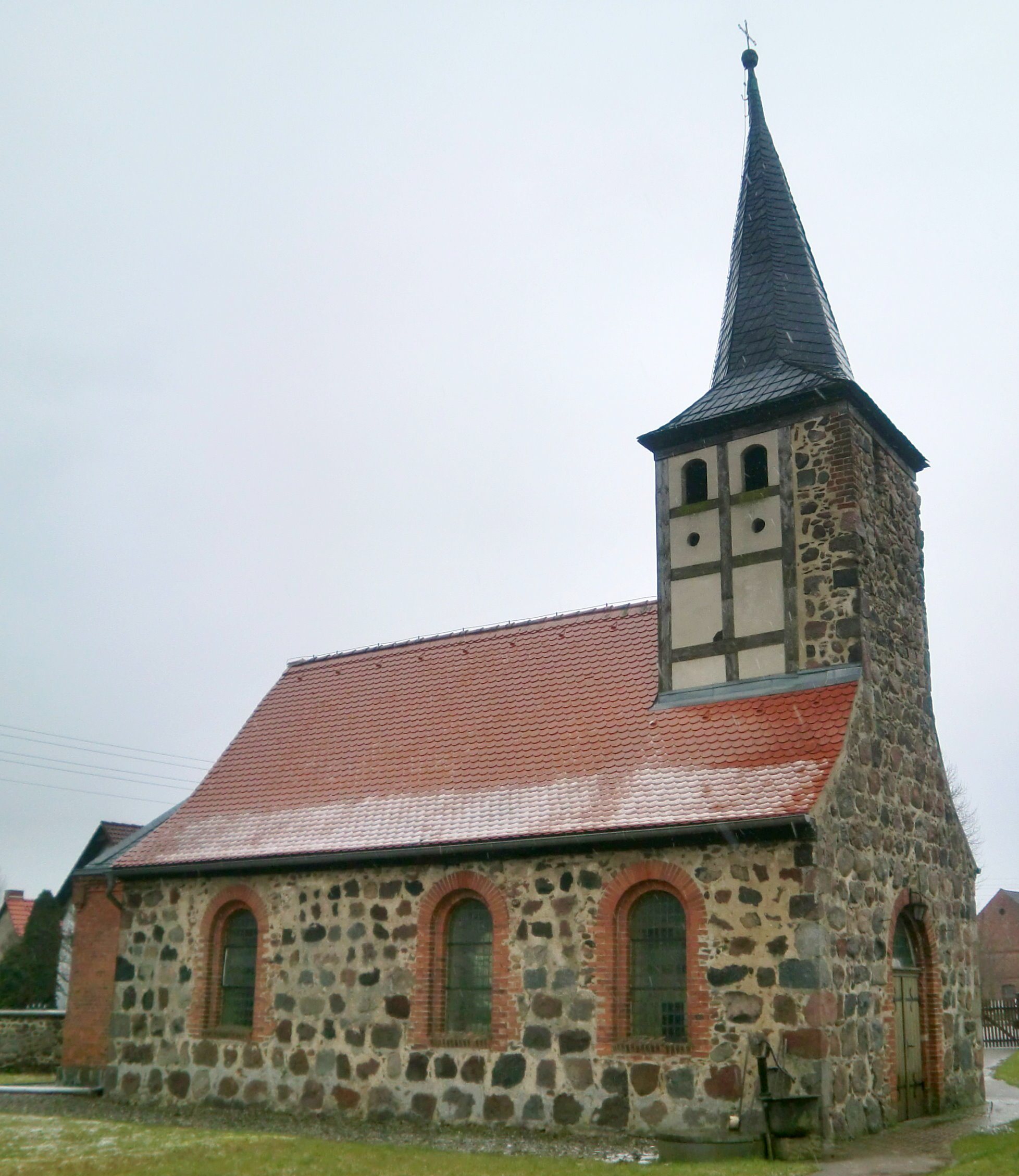 Dorfkirche Windberge, Nordwestseite